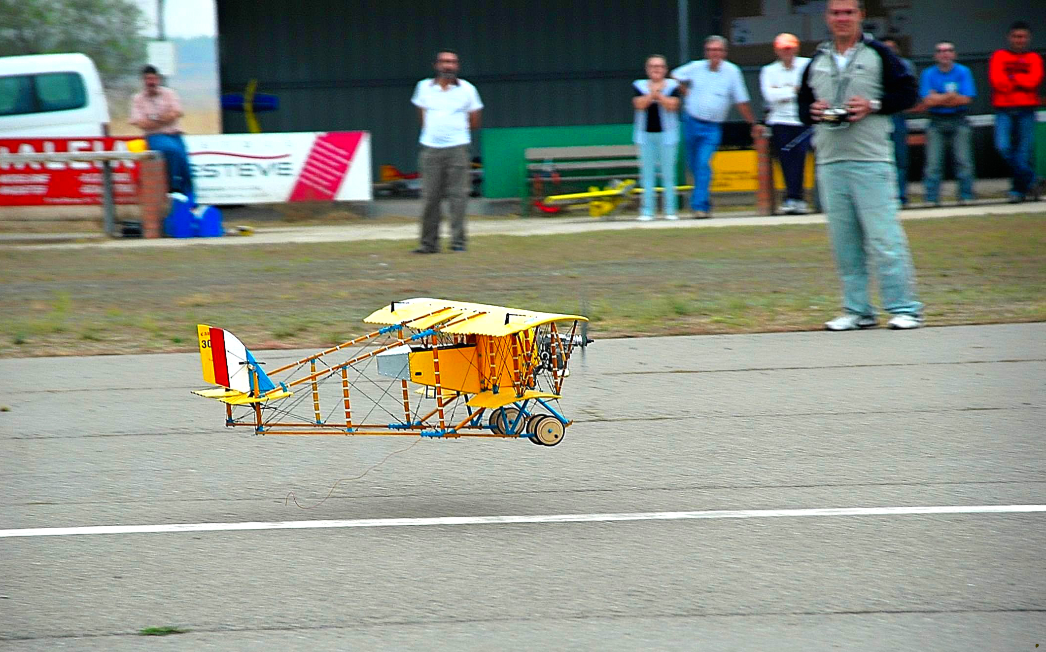 Vuelo teledirigido por radio-control, de la maqueta a escala, del aeromodelo Caudrón G3.